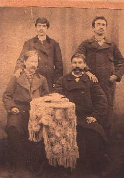 Григор Пърличев и Димитър Узунов (седнали)